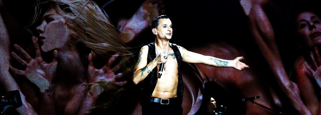 Dave Gahan - Nahaufnahme - Bilbao BBK live 2013